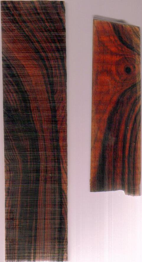 Darstellung von Farbe und Maserung im Rohzustand